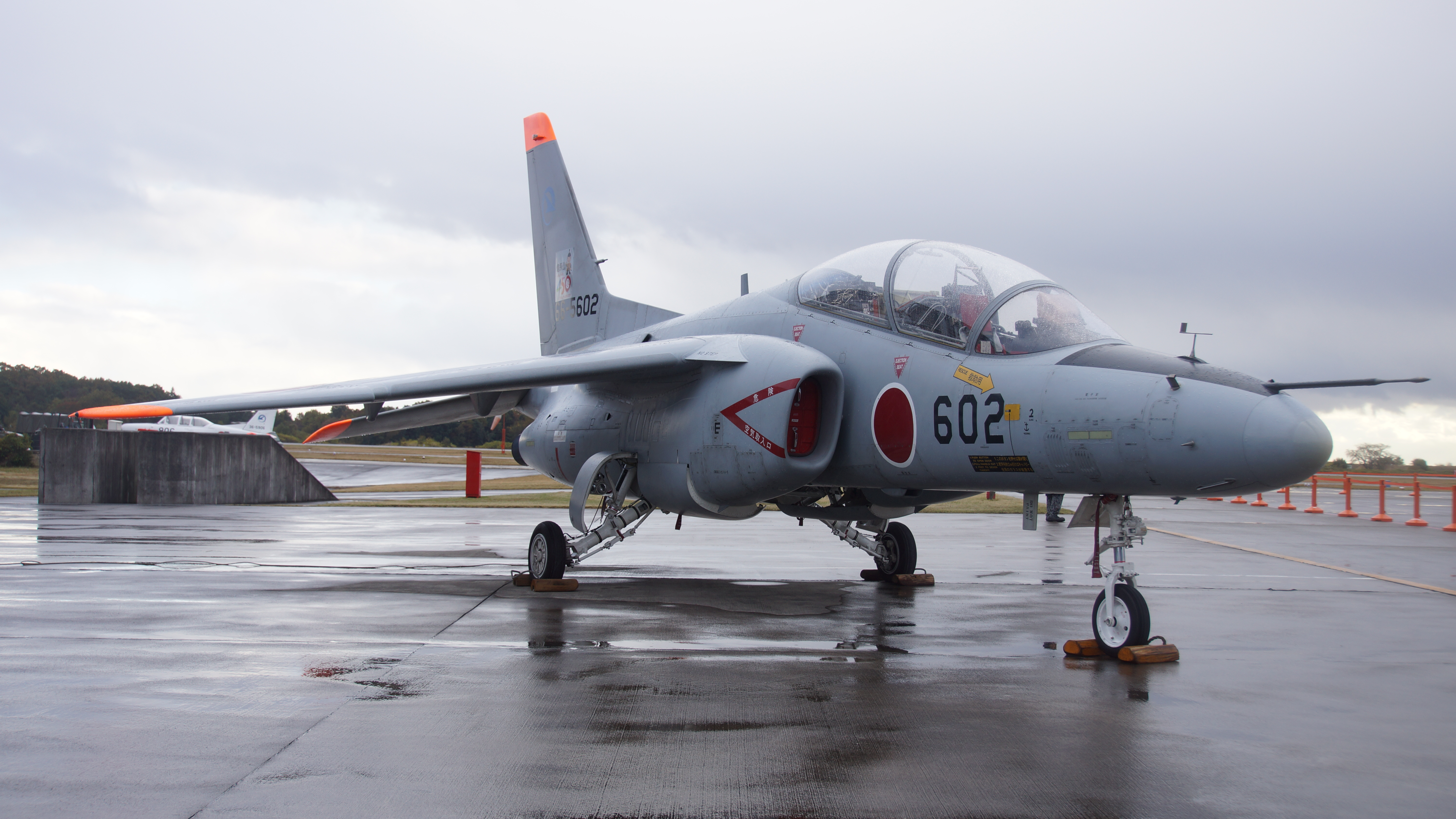 航空自衛隊 T-4練習機（66-5602号機） 右前面。2017年11月19日 岐阜基地にて。